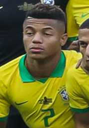 (Rio de Janeiro - RJ, 07/07/2019) Presidente da República, Jair Bolsonaro, durante a final da Copa América 2019, entre as seleções do Brasil e Peru. Foto: Clauber Cleber Caetano/PR